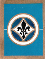 Sammelbild der Garbáty-Zigarettenfabrik mit dem Wappen des SV Darmstadt 98 aus dem Jahr 1930.